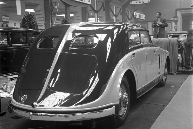 Die Eröffnung der großen Internationalen Automobilausstellung am Kaiserdamm in Berlin ! Der schönste und teuerste deutsche Wagen auf der Ausstellung. Der große "Maybach Zeppelin" mit seiner interessanten Stromlinienführung kostet 43000 Mark. Er erreicht spielend eine Stundengeschwindigkeit von 200 Km.